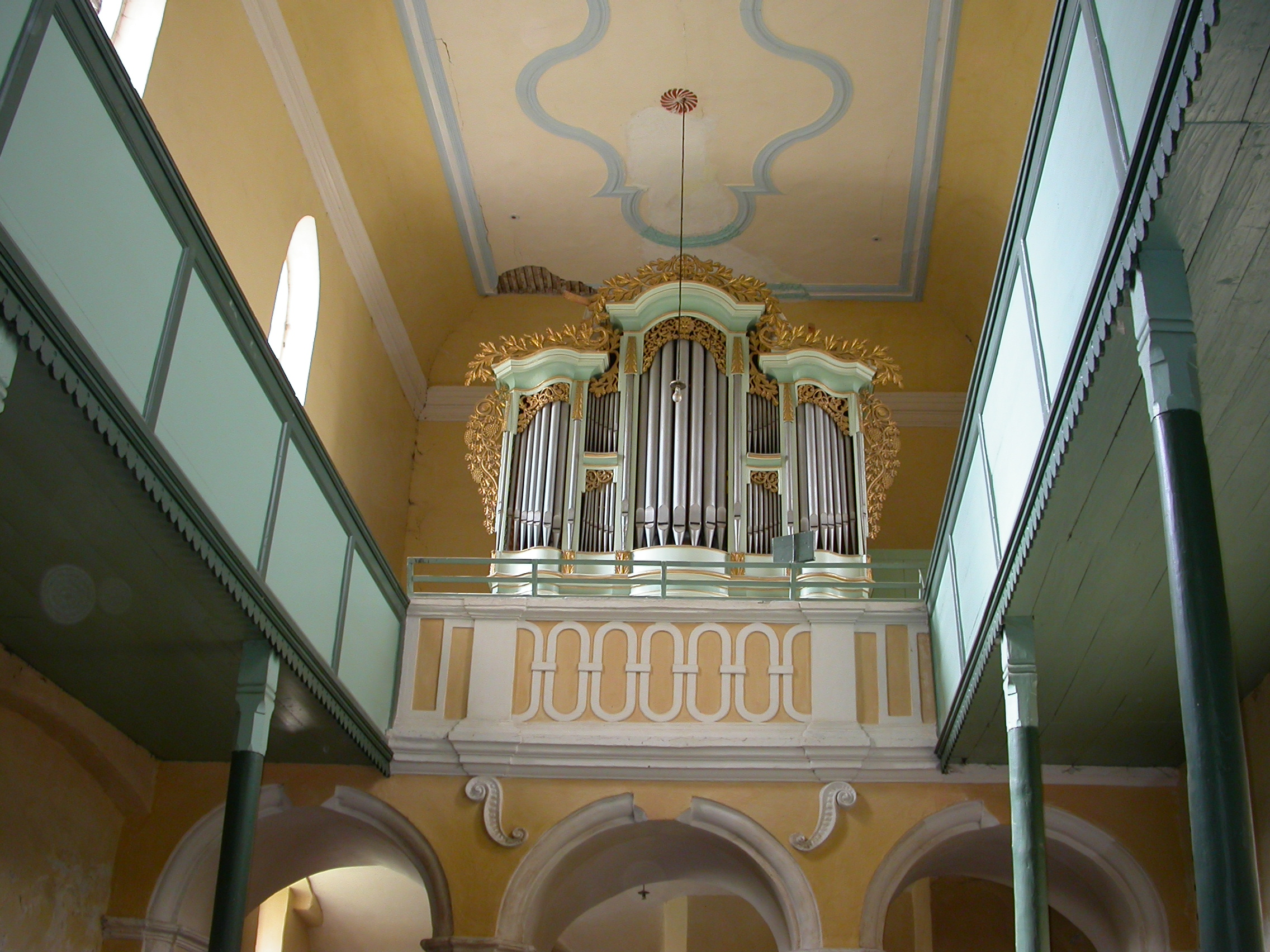 Ansamblul bisericii evanghelice fortificate, sec. XIV - XVIII